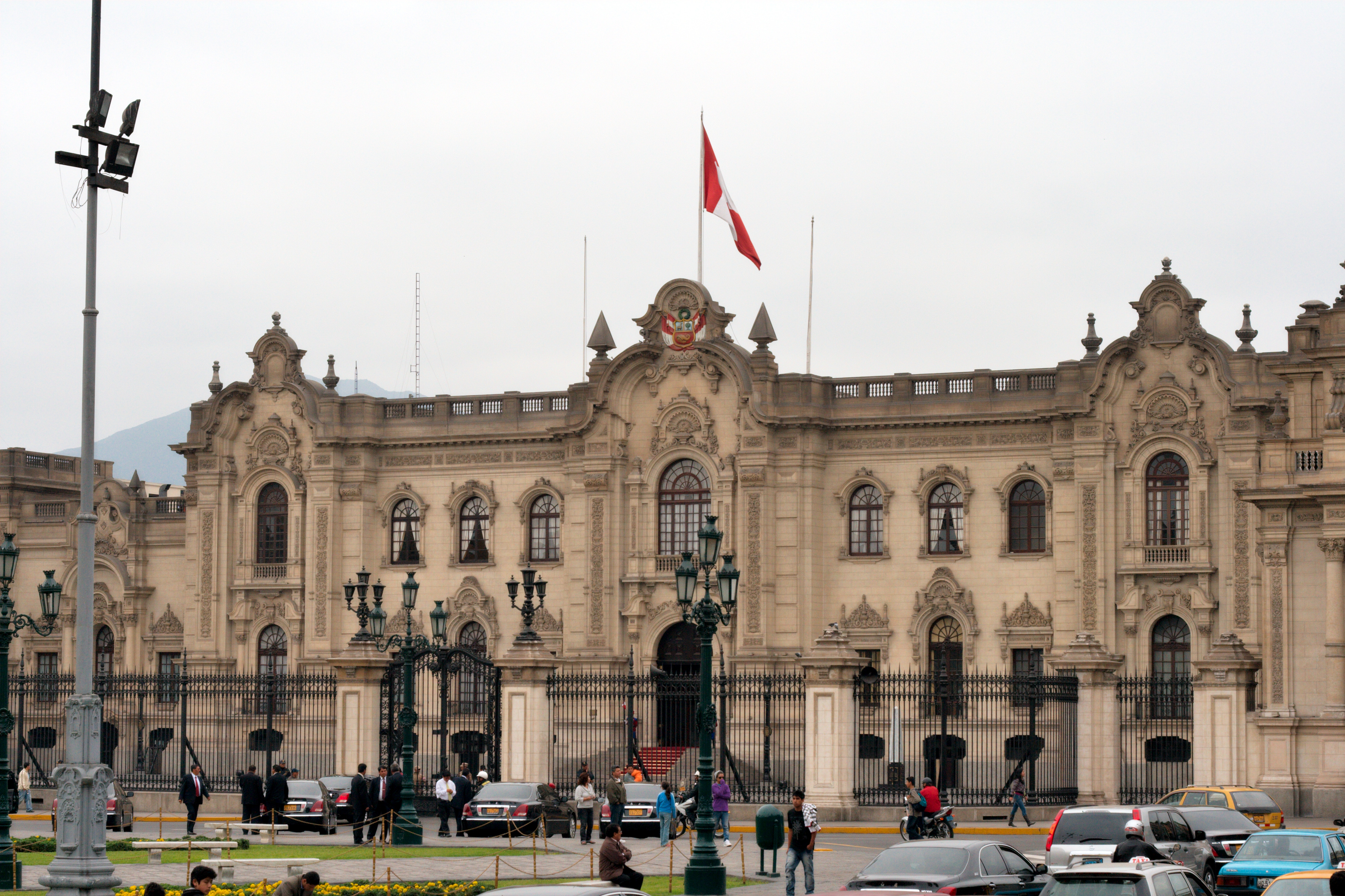 Presidential Palace, Lima, Peru